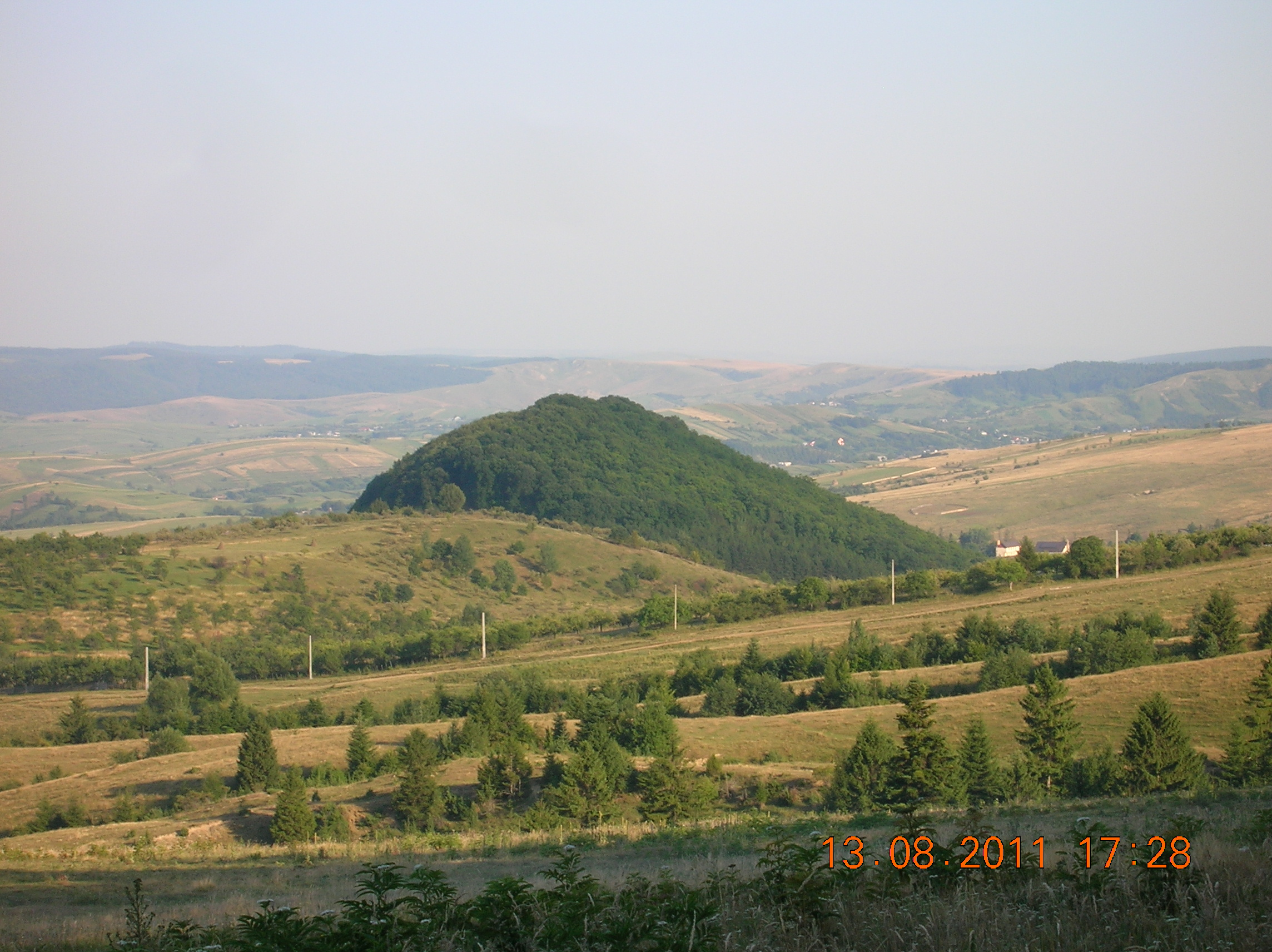 Jud. Neamţ, Munţii Stânişoarei, Parcul Natural Vânători Neamţ, Codrii de Aramă